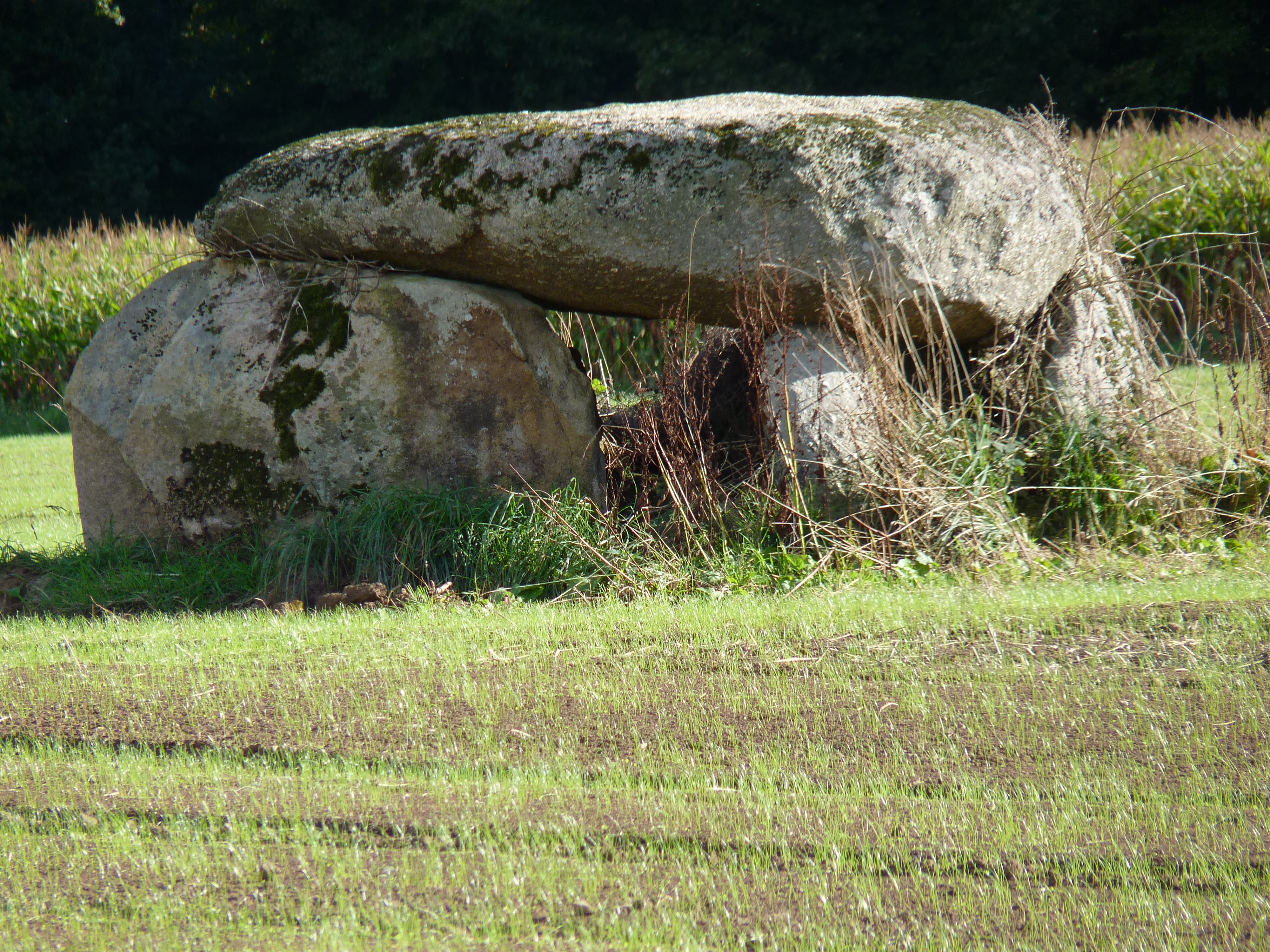 Dolmen situé dans un champ (assez loin du chemin).